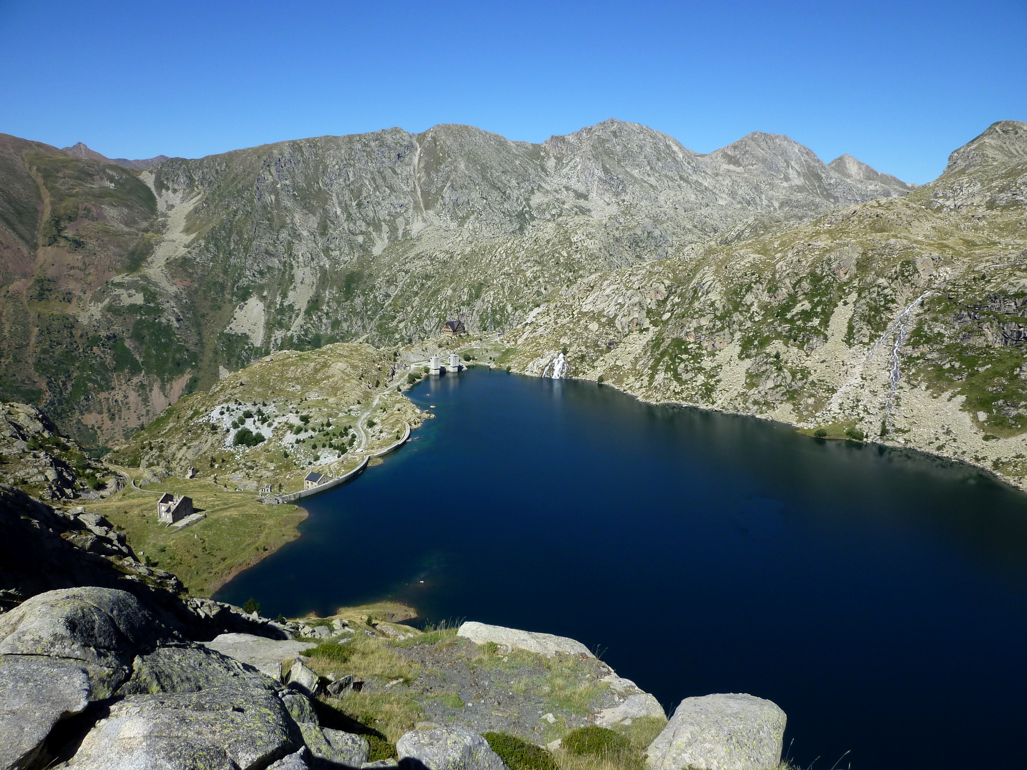 L'Estany Gento a Cabdella (Pallars Jussà), des de la Coma d'Espòs This is a a photo of a natural area in Catalonia, Spain, with id: ES510081